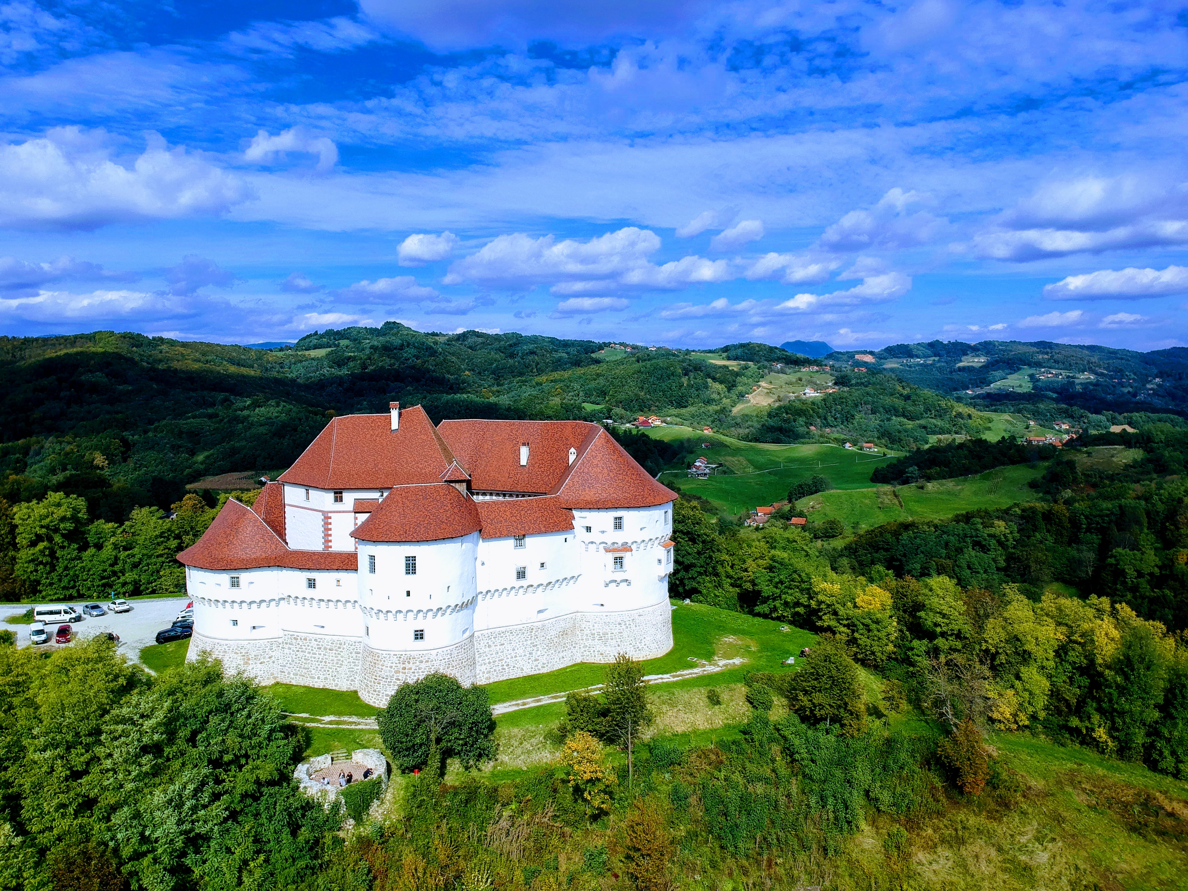 Fotografija fotografirana dronom